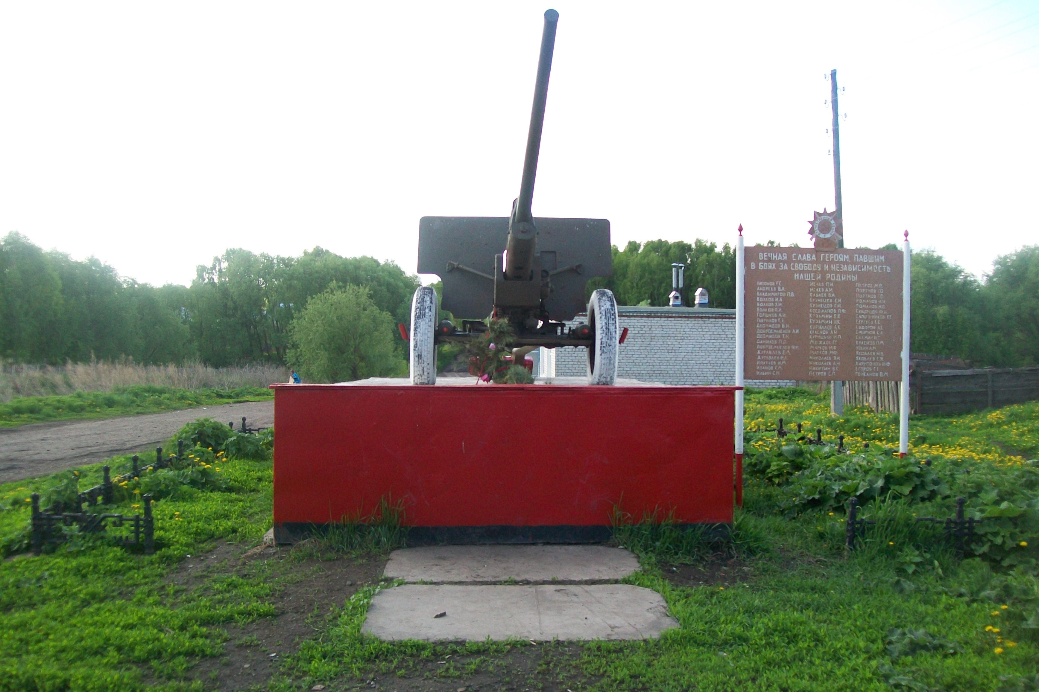 д.Ново Изамбаево памятник пушка.